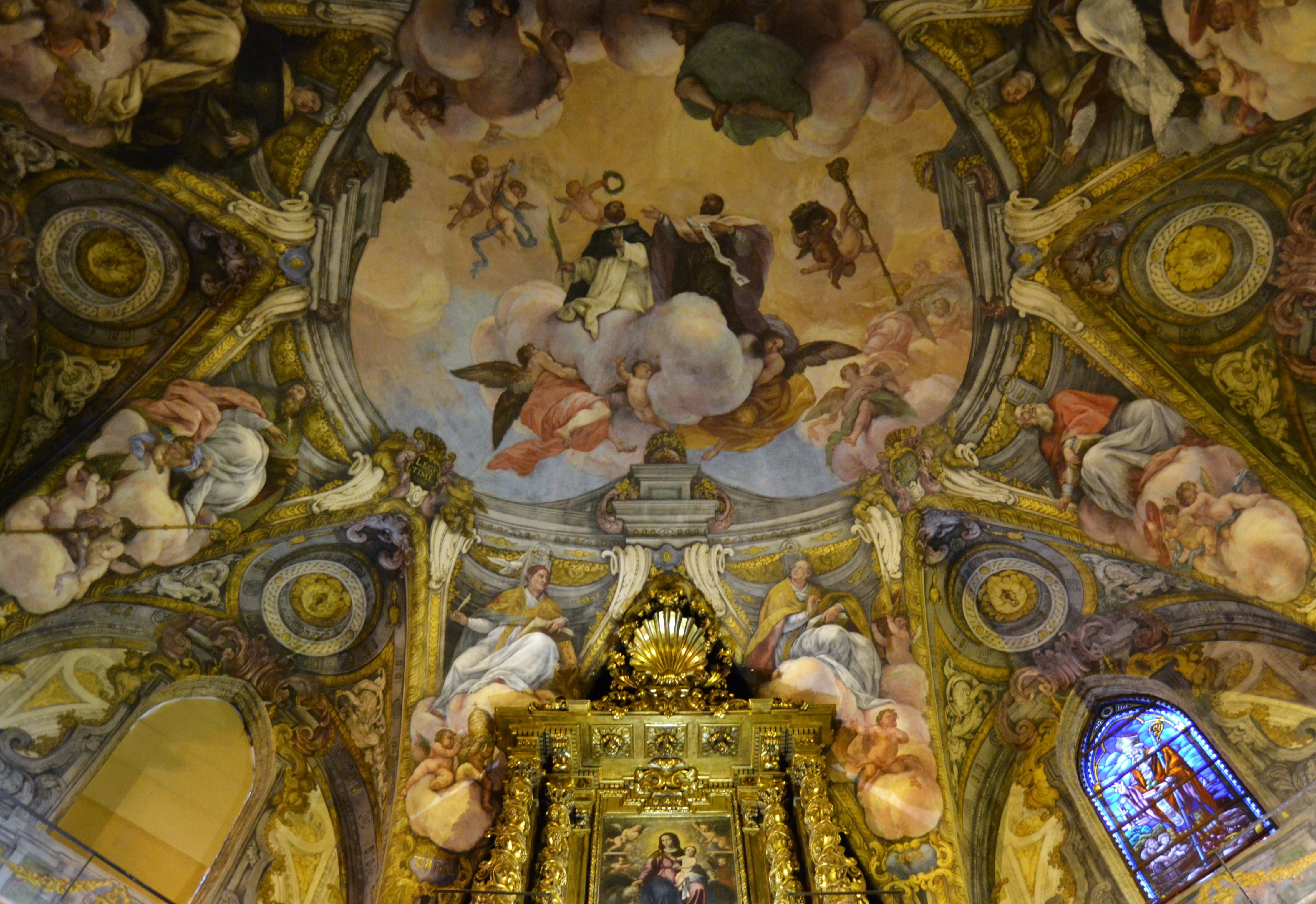 Volta del presbiteri de l'església de sant Nicolau, València.